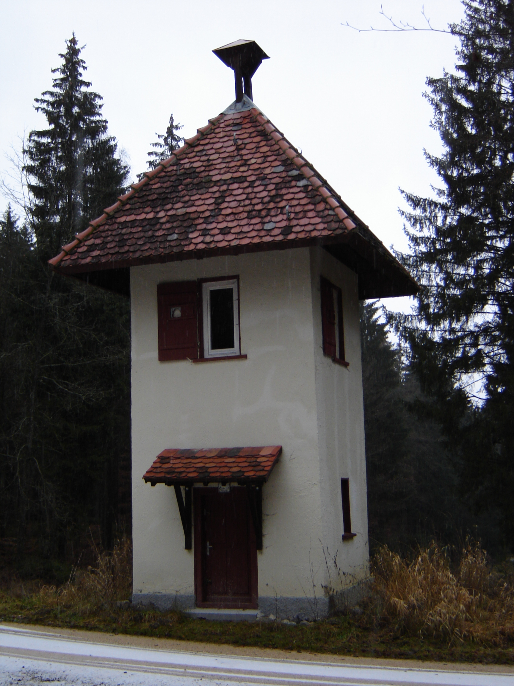 Hohschirm im Wildpark Josefslust, Landkreis Sigmaringen, Deutschland